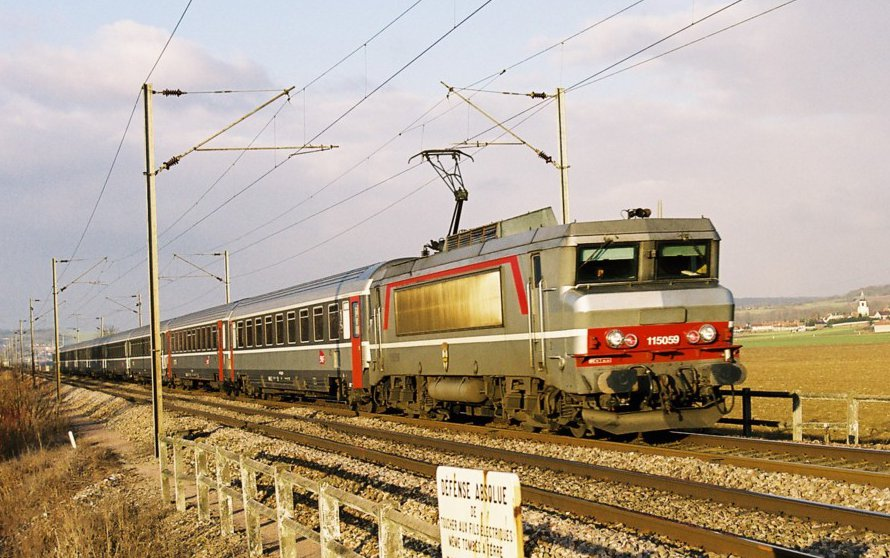 Train Corail tracté par la BB 115059 à Nogentel (02) ; livrée Corail+.